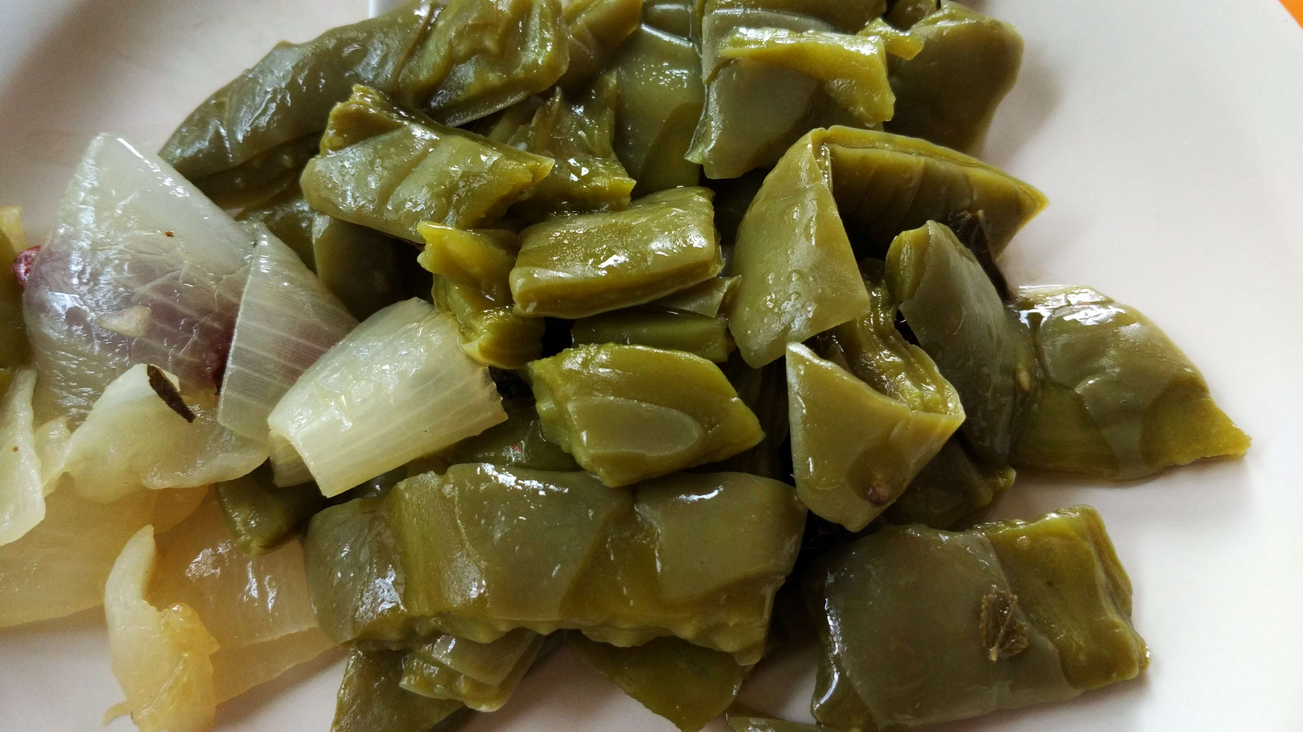 A nopal salad